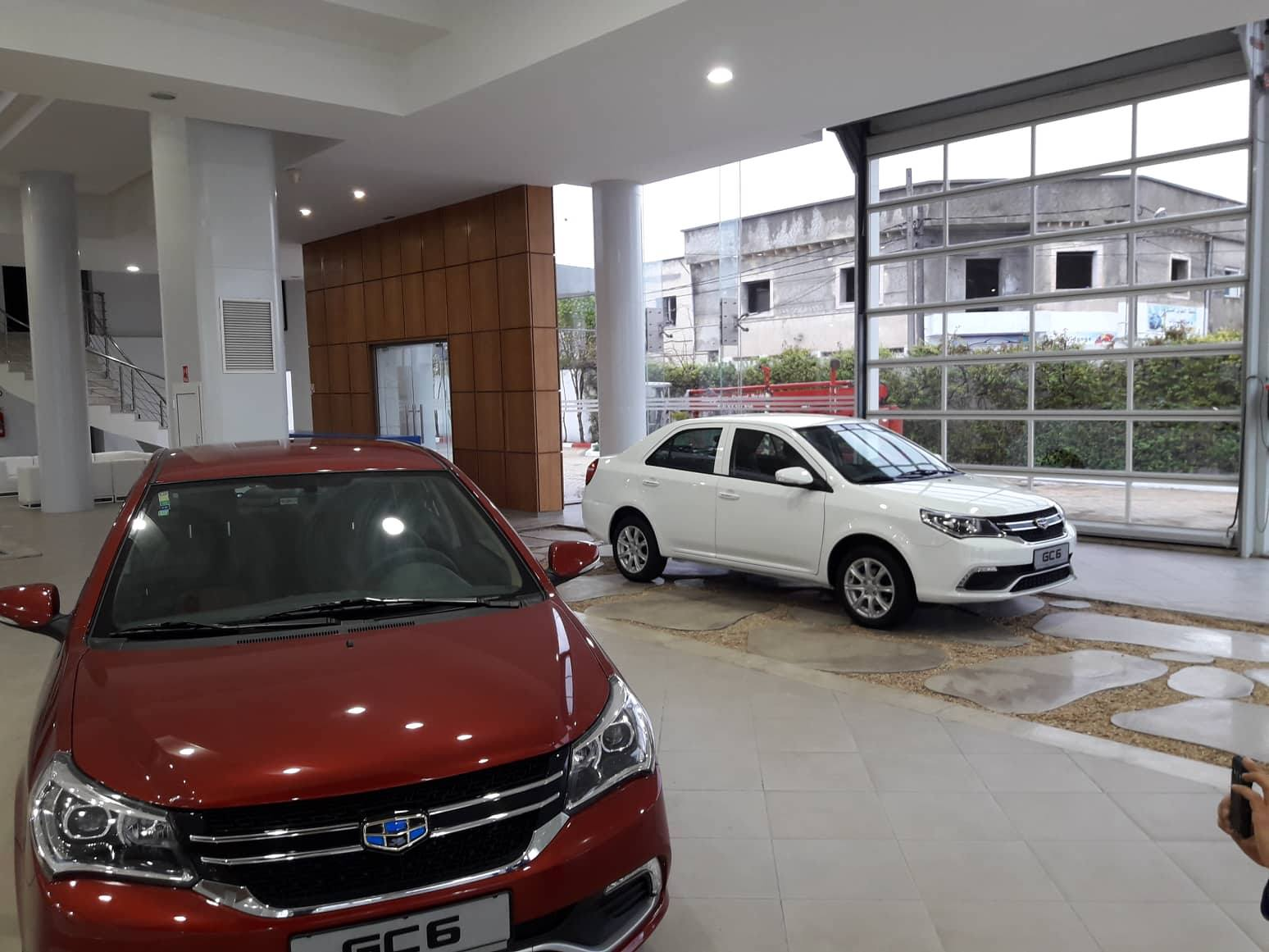 Geely GC6 assemblée par Medicars à Sousse Tunisie